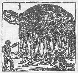 Imatge treta d'una auca nou-centista. Suposo que haurà donat temps de caducar els drets d'autor. Llull 09:30 2 ago, 2004 (UTC)